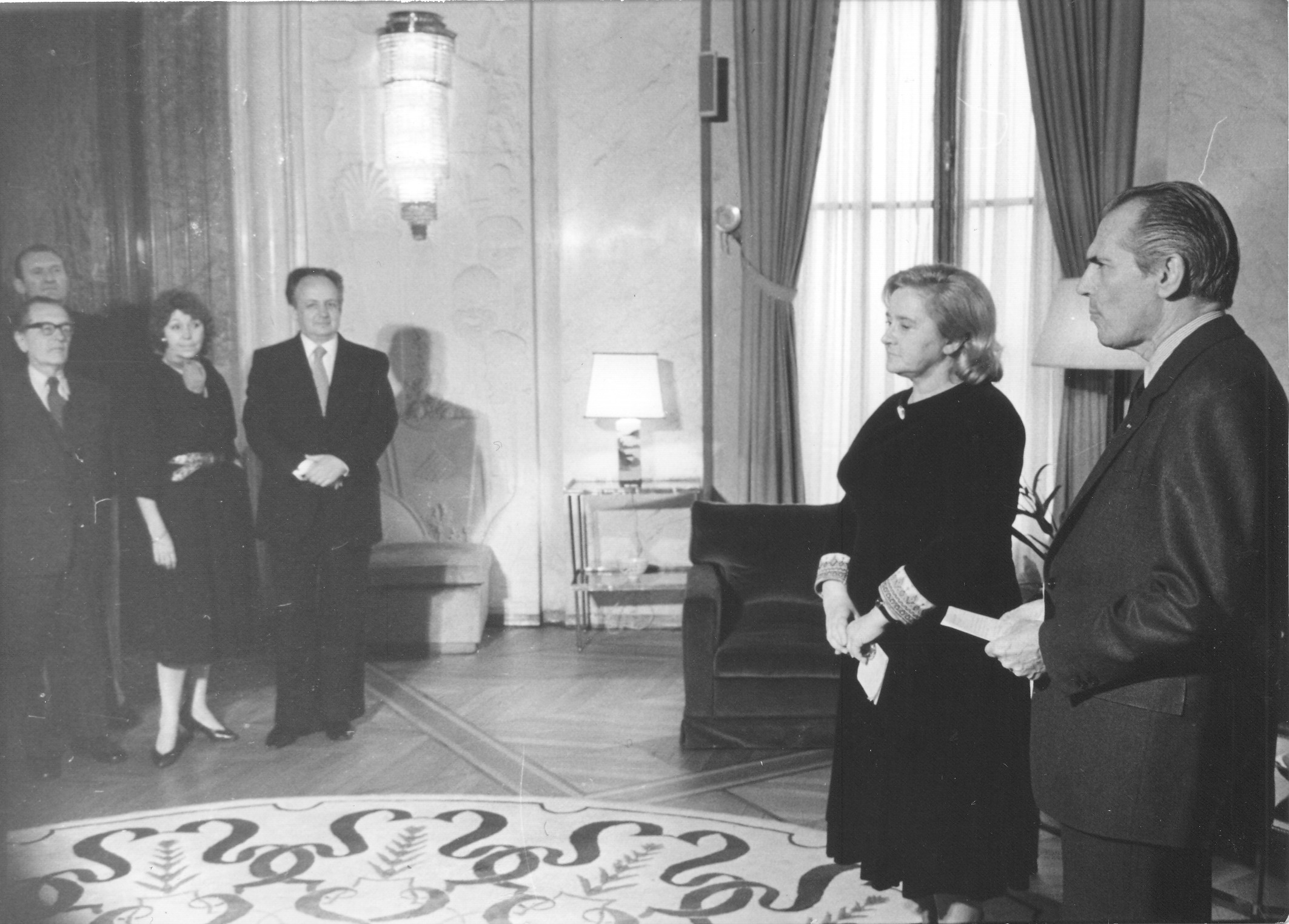 Мира Алечковић на свечаности приликом додељивања Легије части у француској амбасади у Београду, 5. мај 1983. Уступио Срђа Николић, син Мире Алечковић.